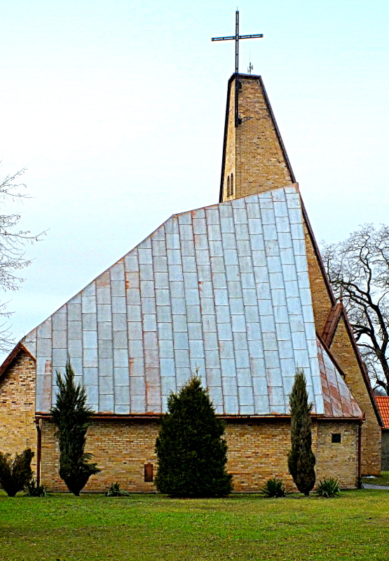 Pasieczna, kościół filialny